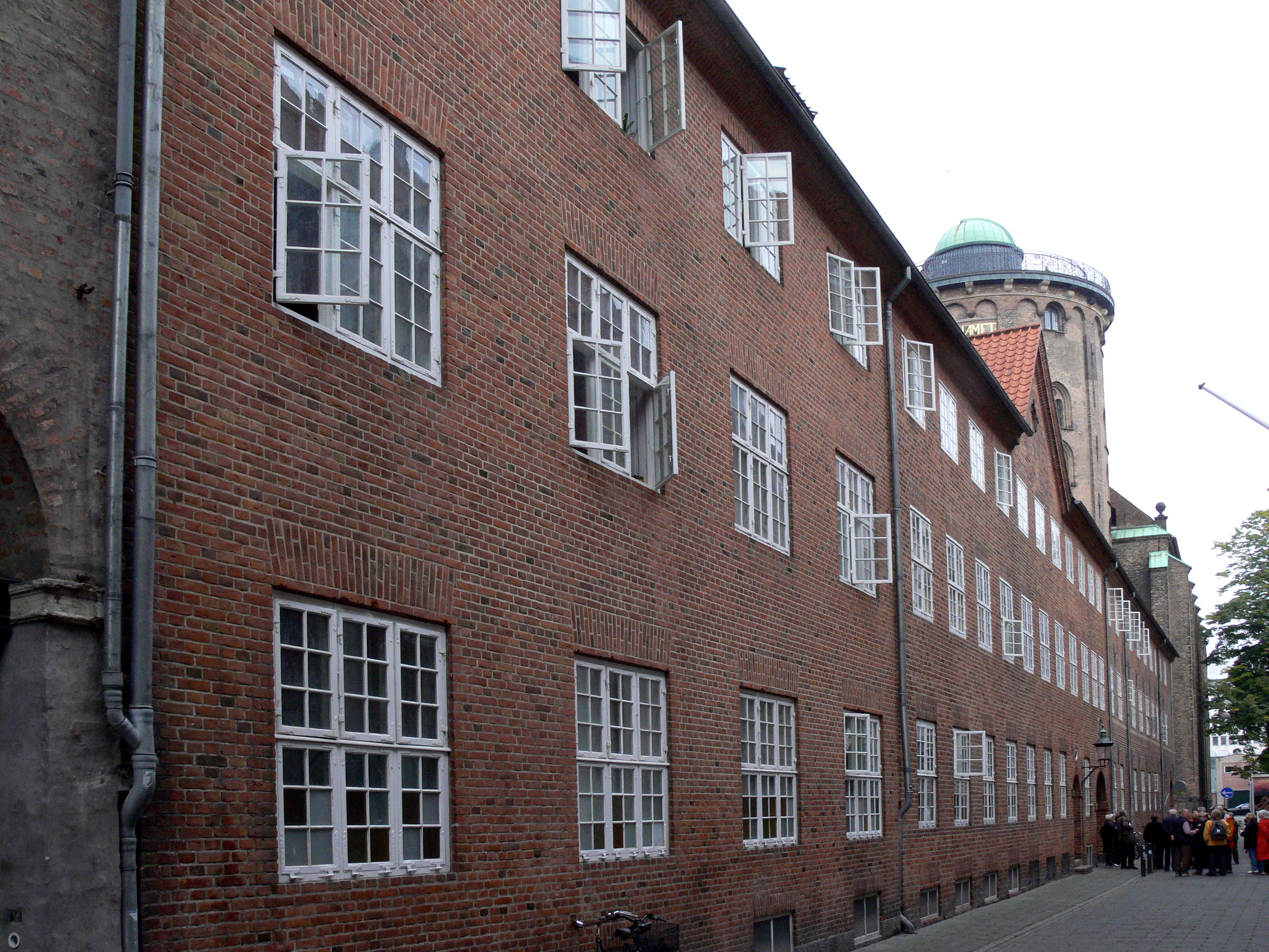 Studentenwohnheim „Regensen“. Hier wohnten alle isländischen Studenten.